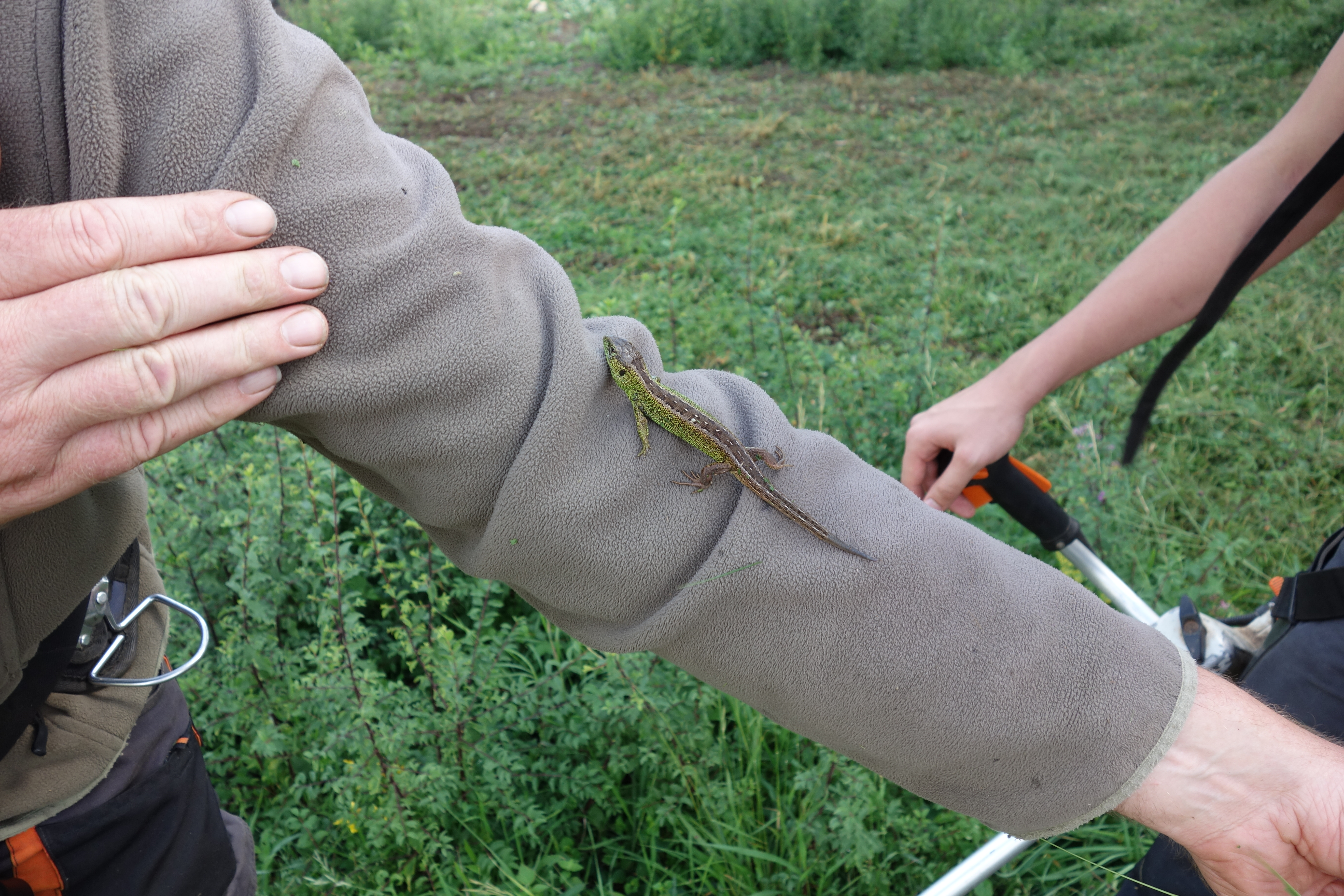 Männliche Zauneidechse (Lacerta agilis) auf Arm eines Mitarbeiters des Landschaftspflegetrupps der Biologische Station Hochsauerlandkreis im Naturschutzgebiet Halbtrockenrasen am Dahlberg.